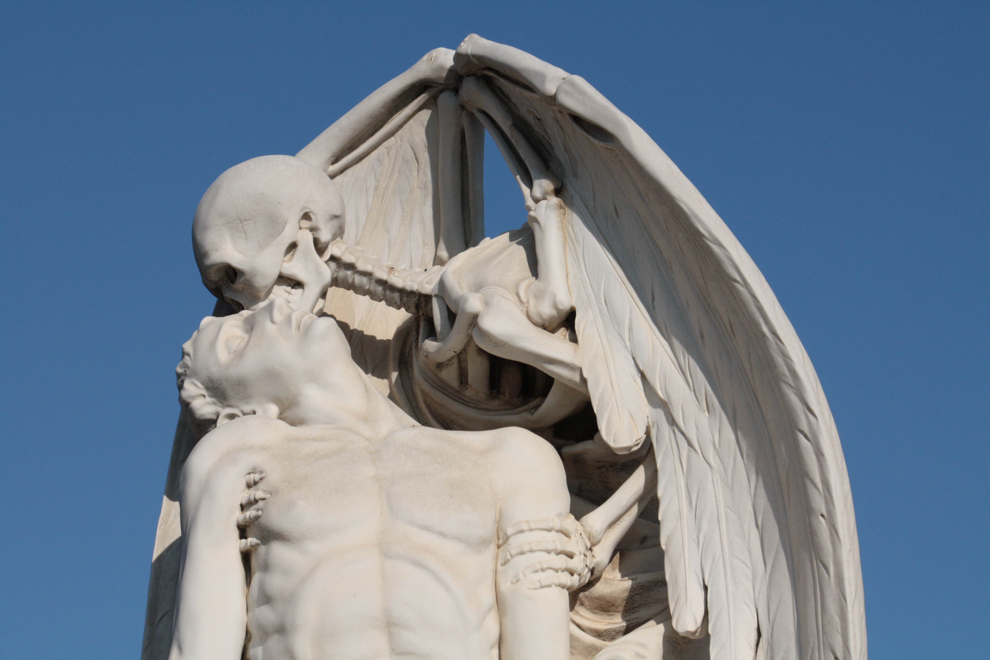 Sepultura disenyada per Jaume Barba, cementiri del Poblenou.